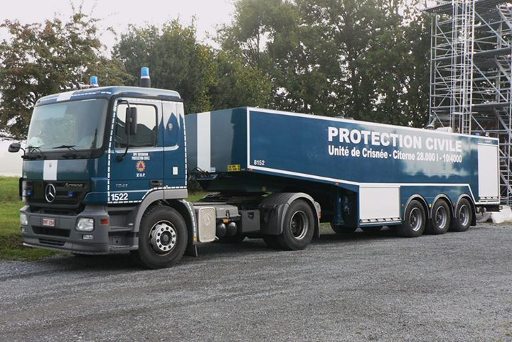 Mobiel Laboratorium CBRN